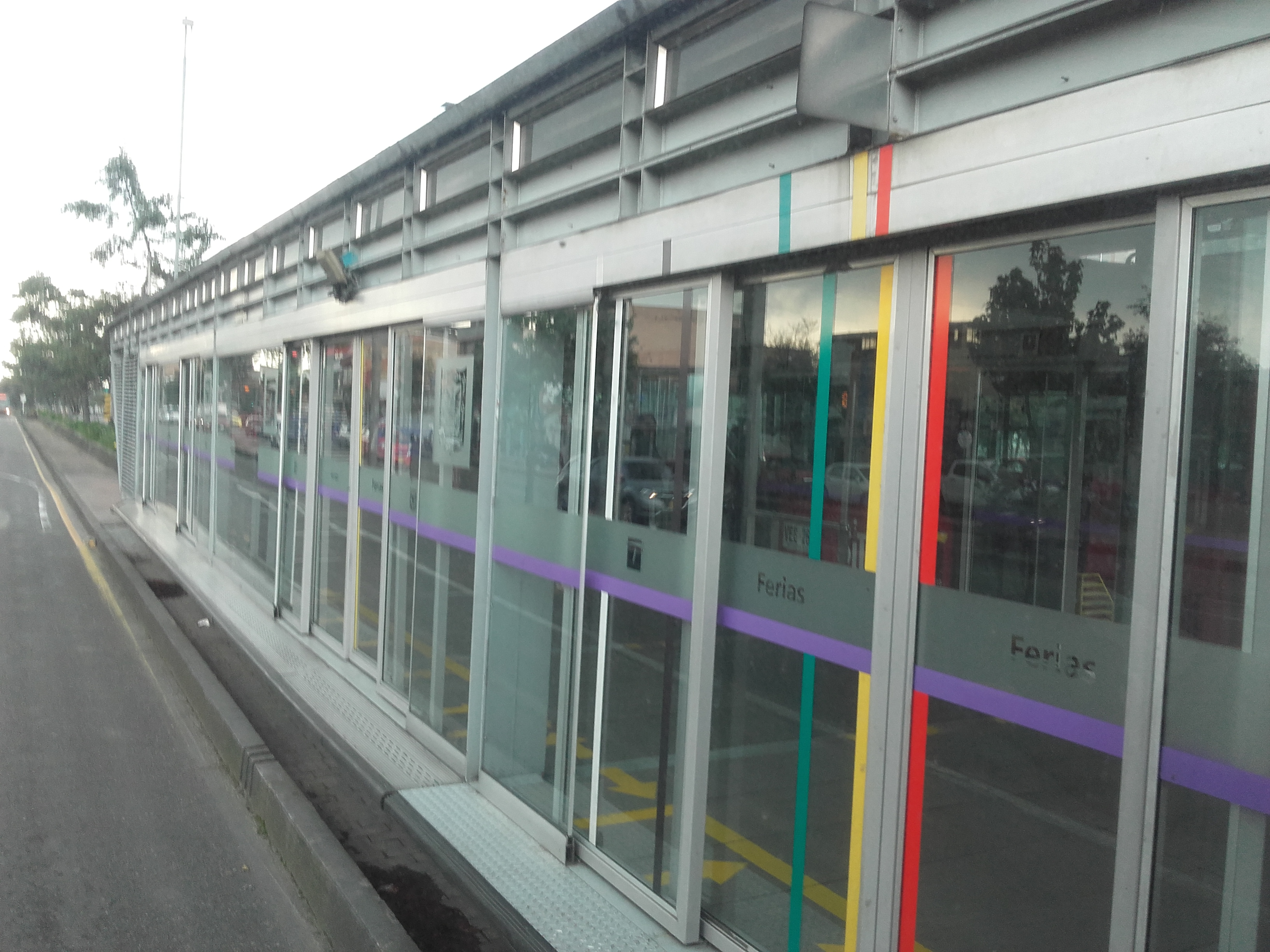 ndndndnenendn